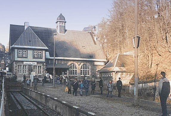 Bahnhof Lauscha (Thür.) Fotograf: presse03, selbst erstellt, Dez. 2001 Lizenz: GNU-FDL Kategorie:Bild:Bahnhof